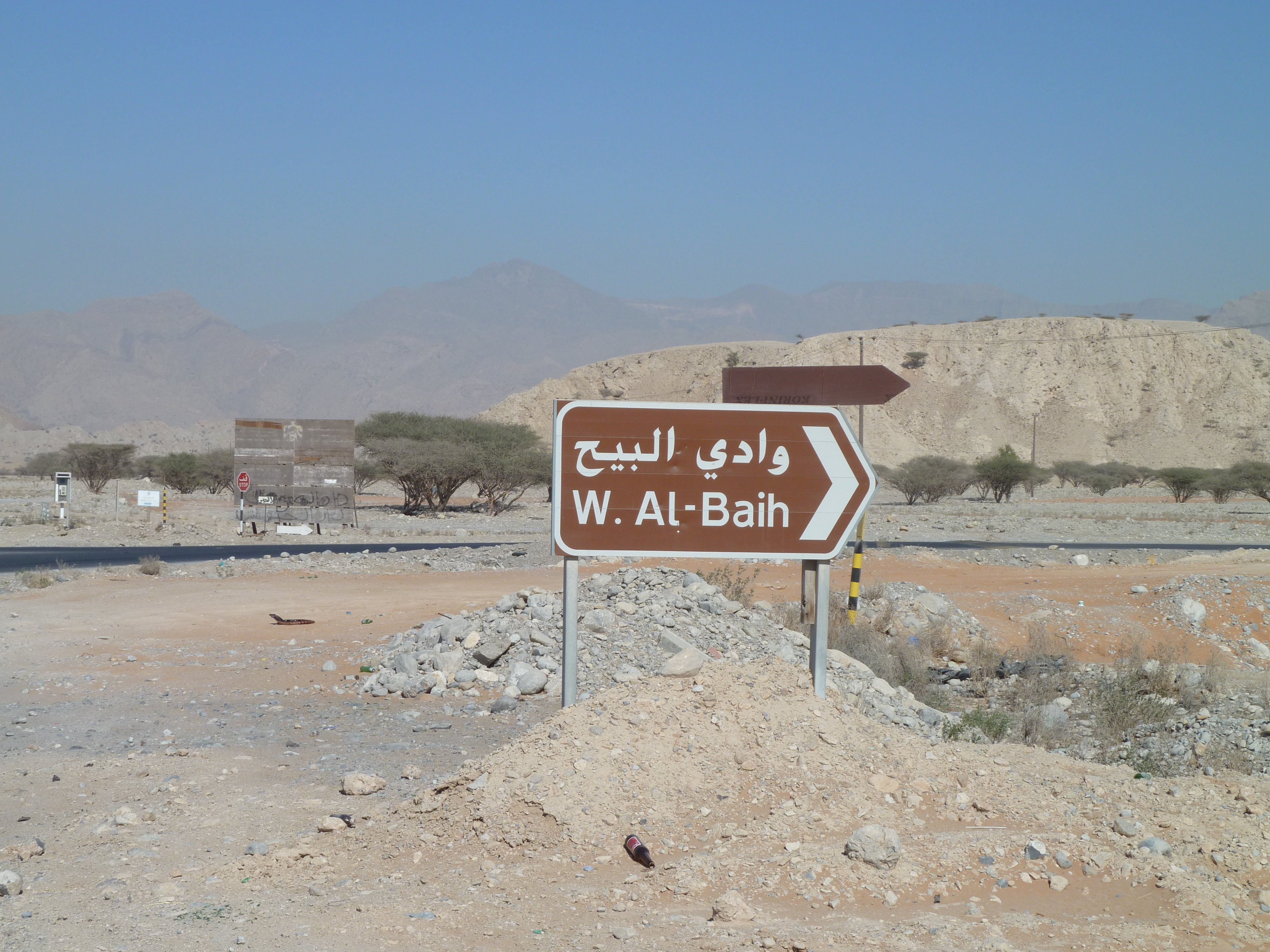 Ras Al Khaimah